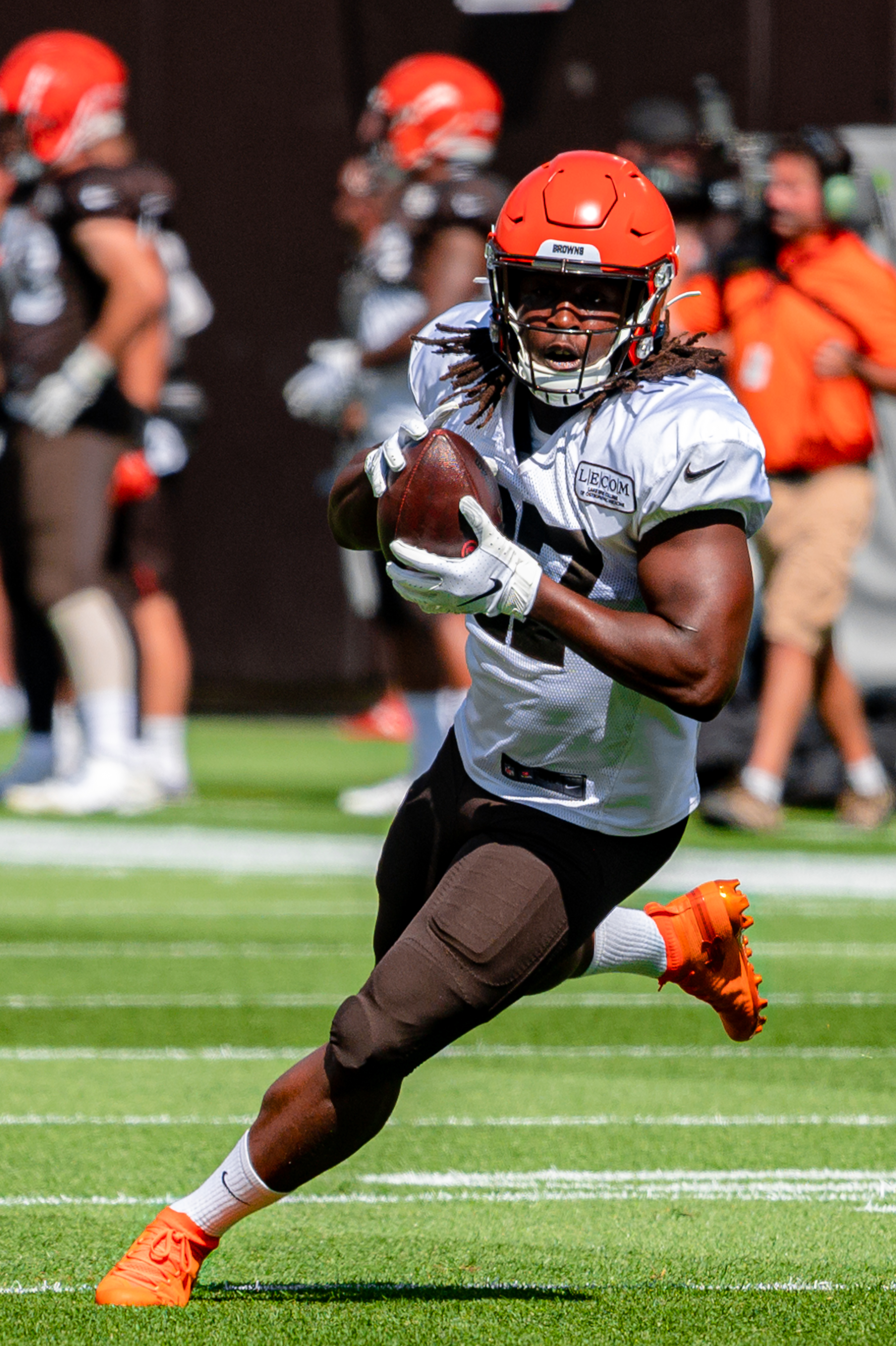 Kareem Hunt